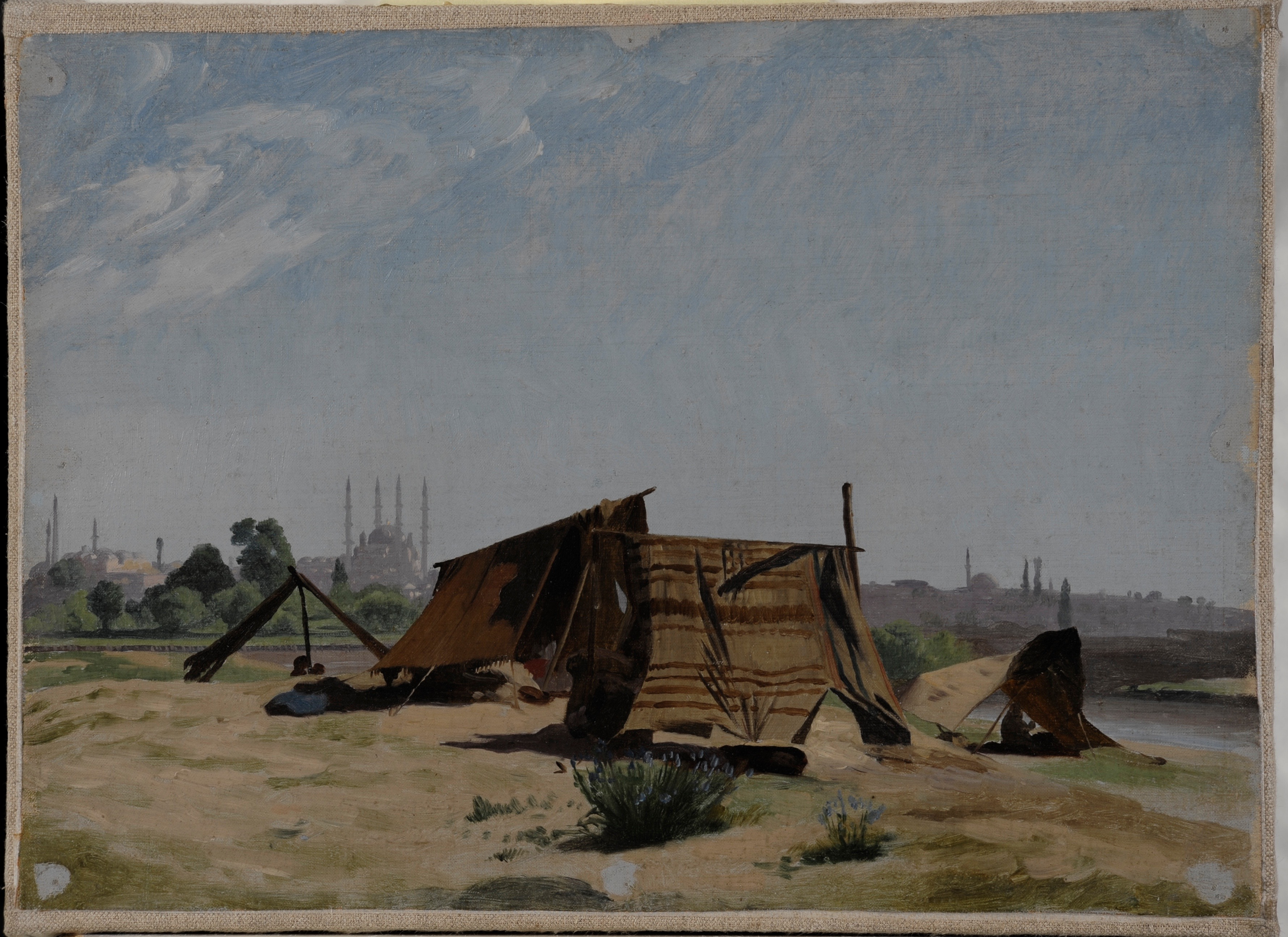 Jean-Léon Gérôme-An Encampment before Constantinople. Oil on Canvas 230x310 mm. This sketch documents on of his journeys to Constantinople Ger Eenens Collection The Netherlands